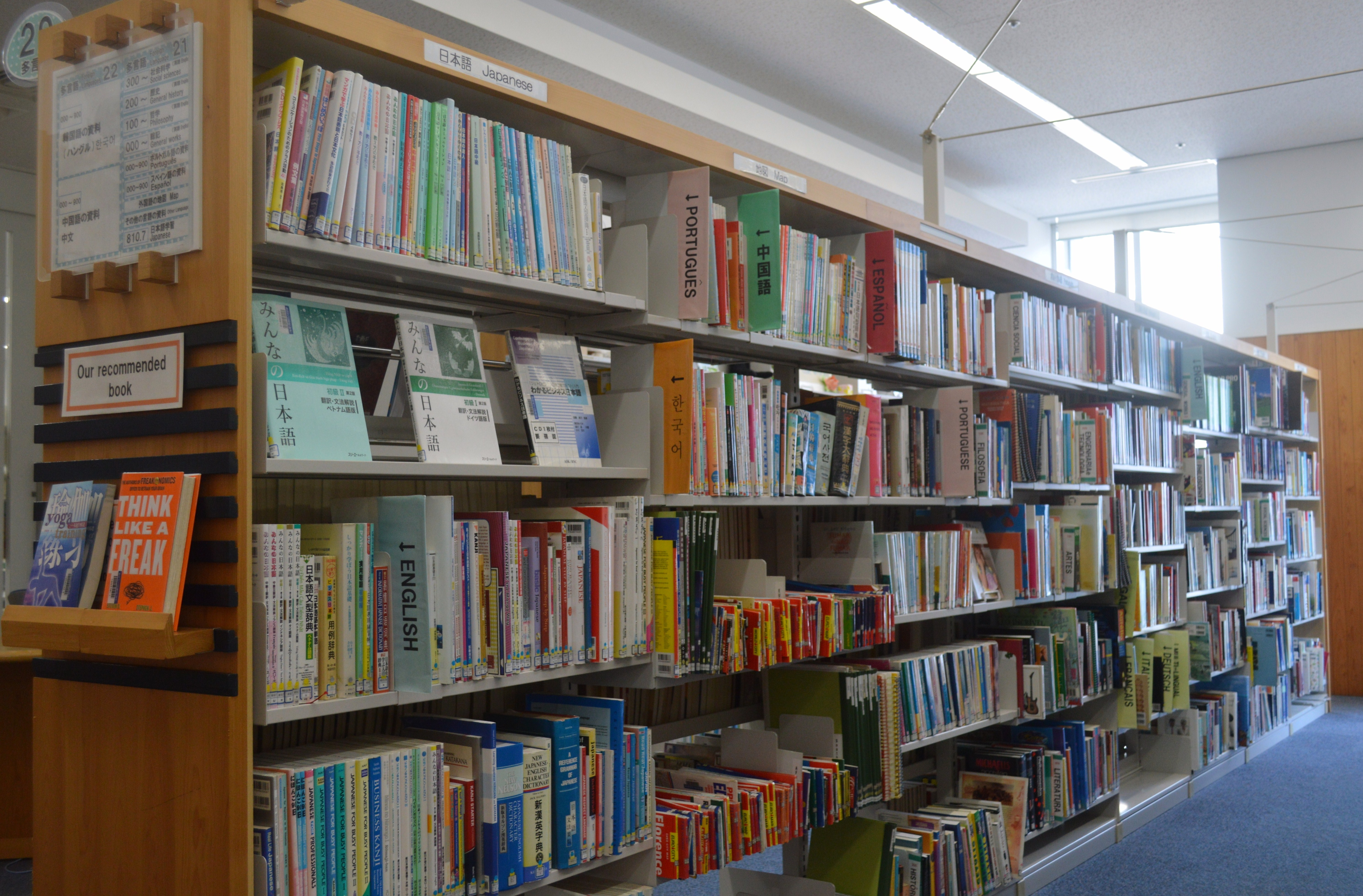 静岡市立御幸町図書館。静岡市立図書館のひとつ。ペガサートビル「B-nest」。